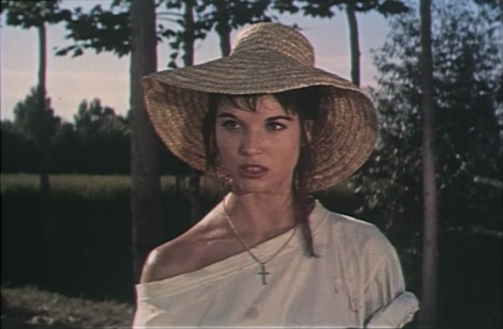 Scena del film La risaia